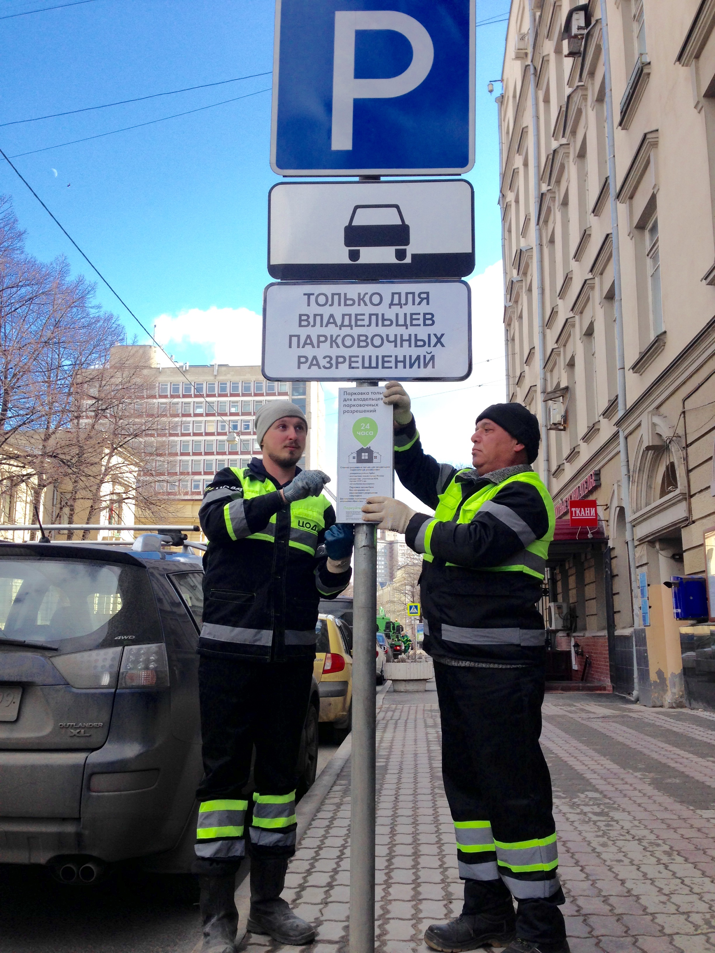 Монтаж знака Знак «Парковка только для владельцев парковочных разрешений» (Москва)